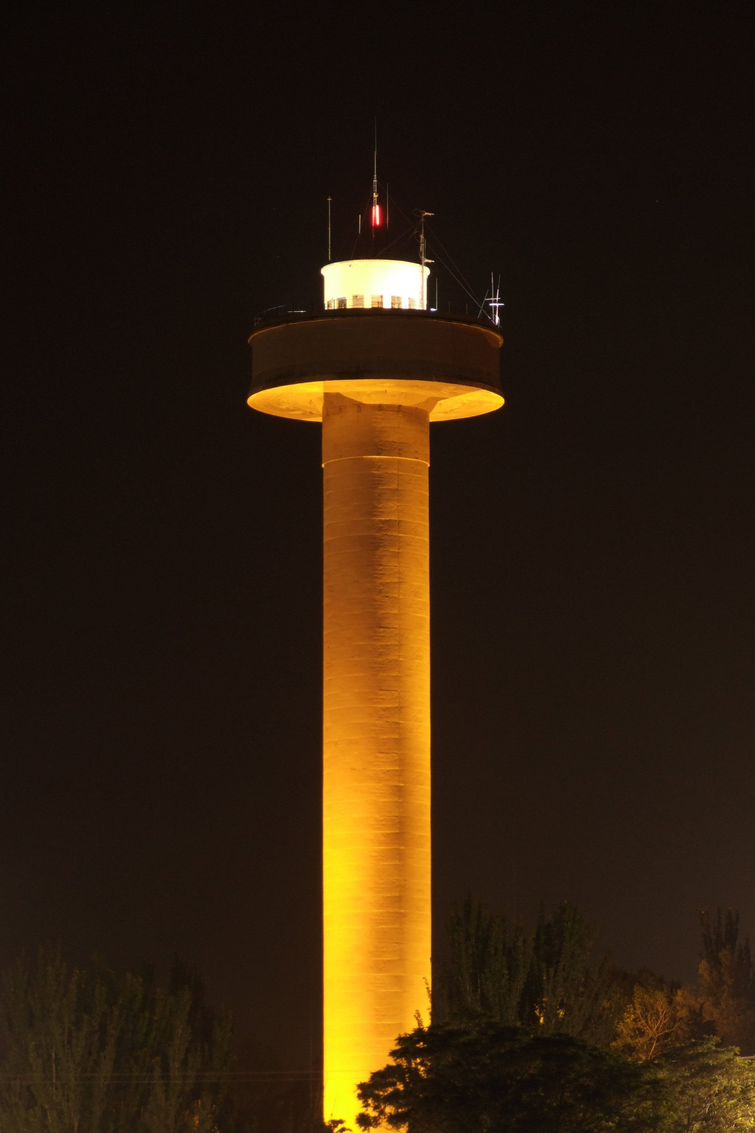 Depósitos de agua del parque de la Fiesta del Árbol. Los antiguos Depósitos del Parque de Lopez Mateo, parque construido hacia 1906, en su inauguración se celebró una "Fiesta del Árbol", nombre por el que popularmente se le conoce. Fue construido entre 1944 y 1947. En 1947 se probó pero el agua alcanzó tanta presión que la mayoría de las tuberías de la ciudad reventaron y se dejó inutilizado desde su inauguración. Actualmente se está recuperando para hacer un mirador, un centro de interpretación de turistas y una centro de interpretación del agua. Inauguración prevista primavera 2011.